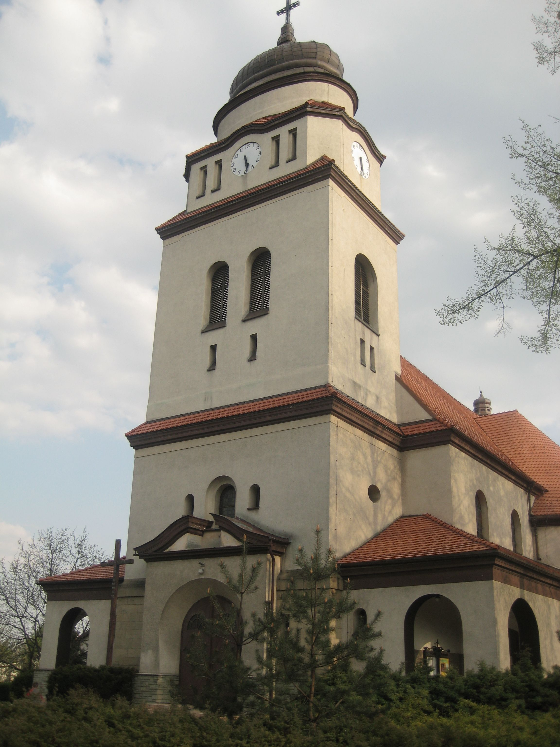 Wyry, kościół parafialny pw NSPJ w Wyrach